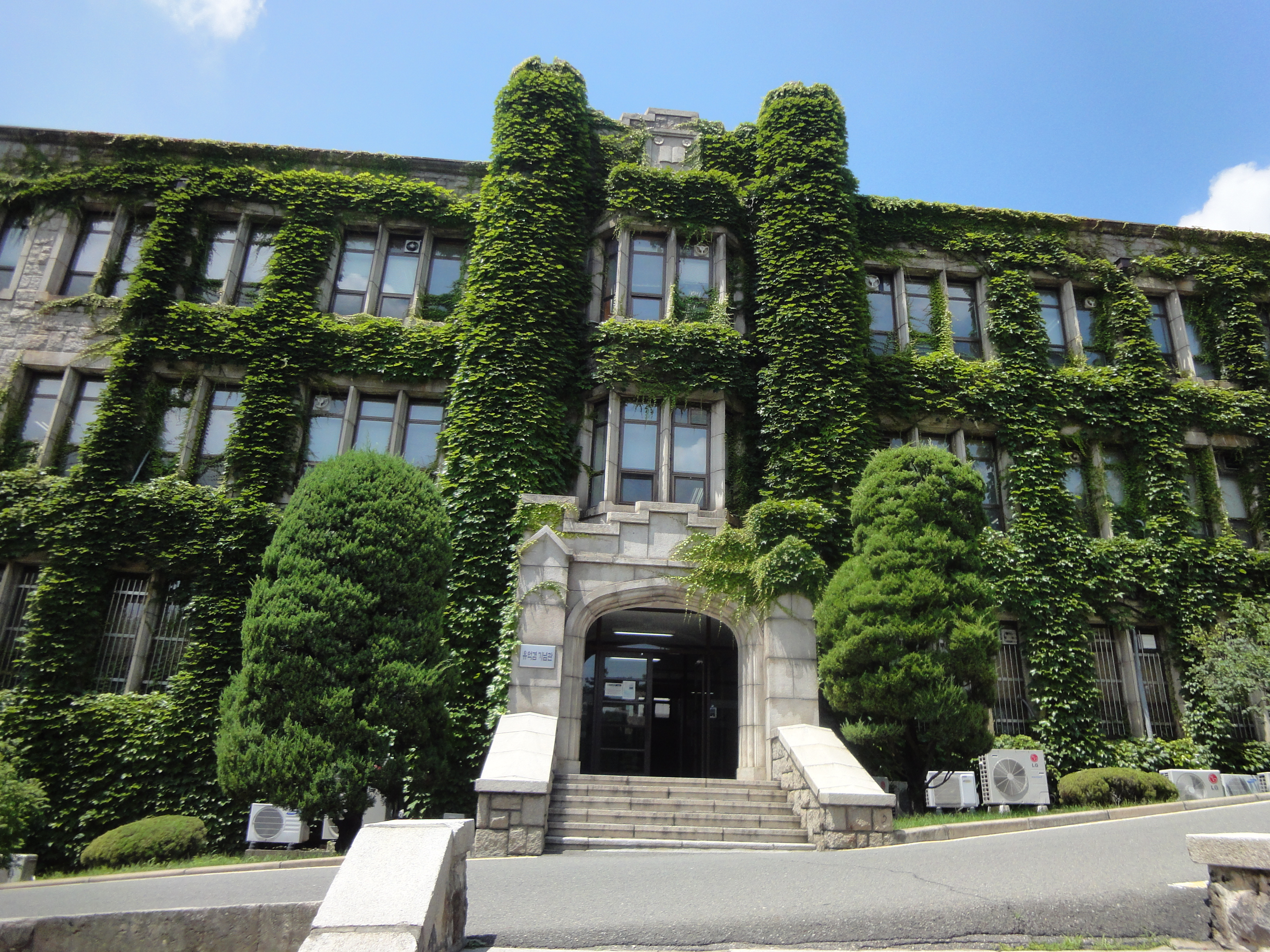 연세대학교 풍경